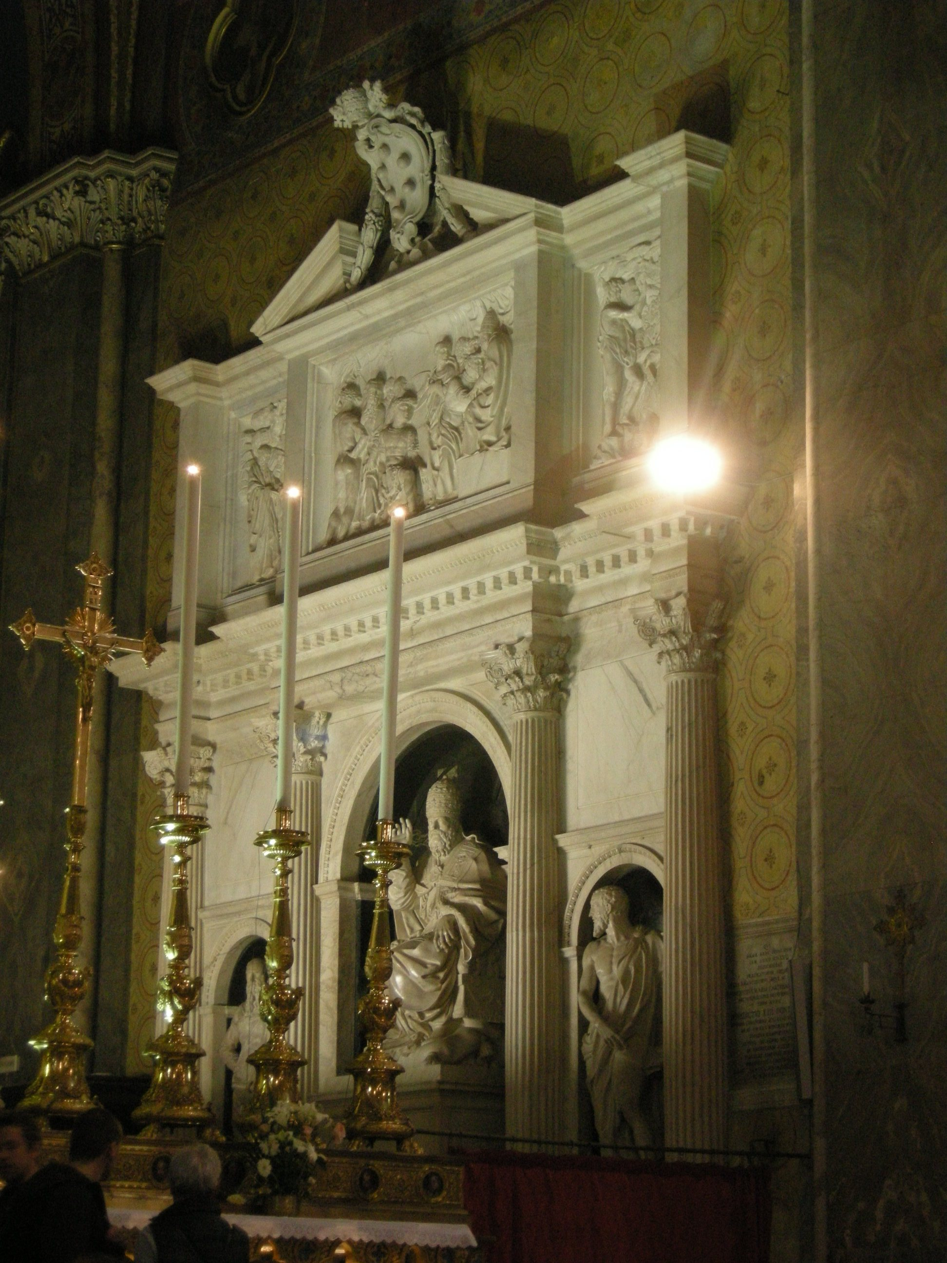 Tomba di clemente VII